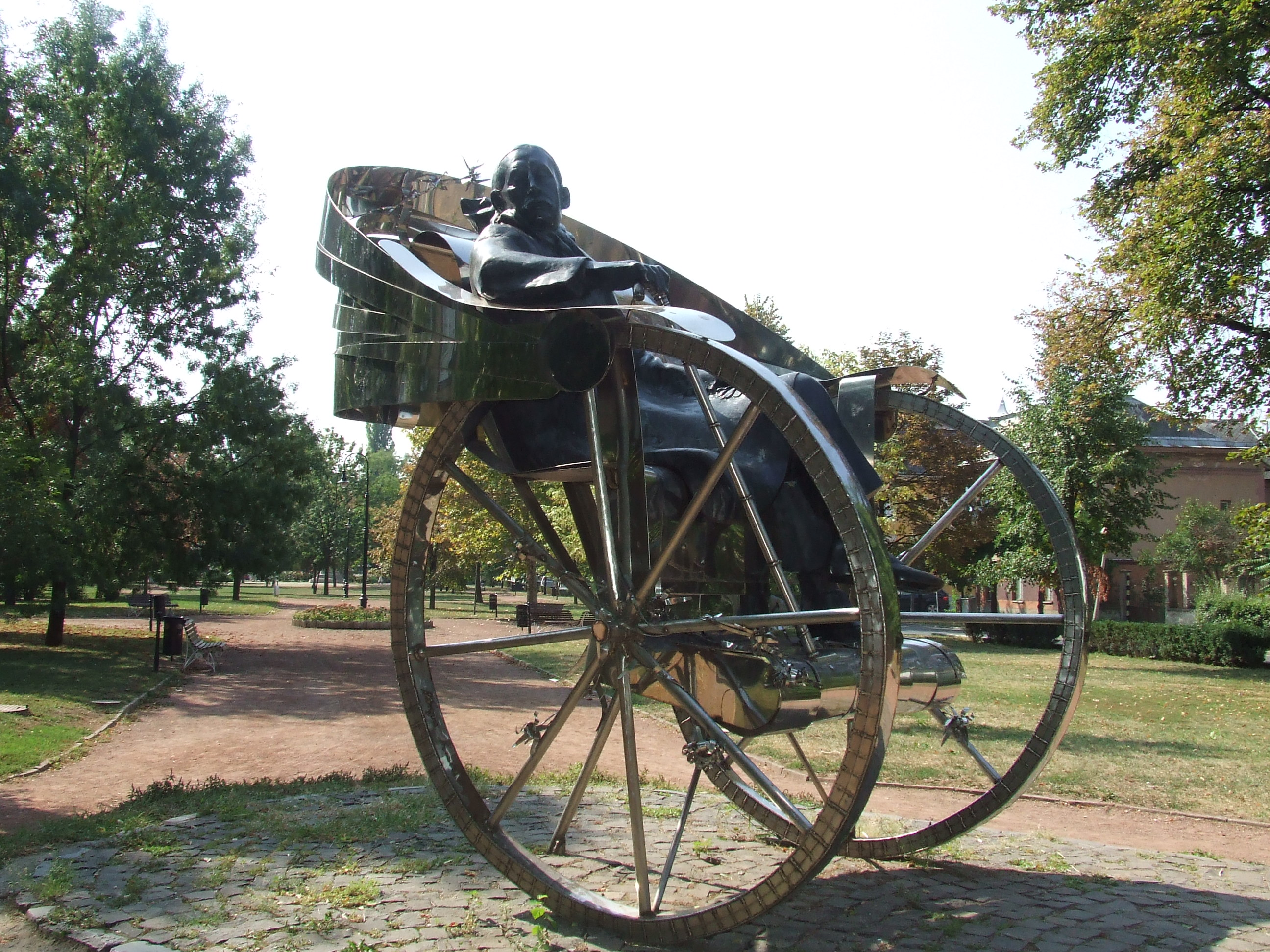 Varga Imre Kossuth-díjas művész "Hazatérés" című alkotása a nyíregyházi Móricz Zsigmond Színház előtt áll. A képen Krúdy Gyula látható.